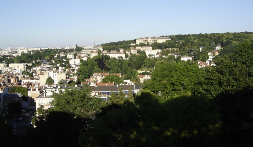 Une photo que j'ai prise de la terrasse de l'Observatoire, un jour de juin 2005.